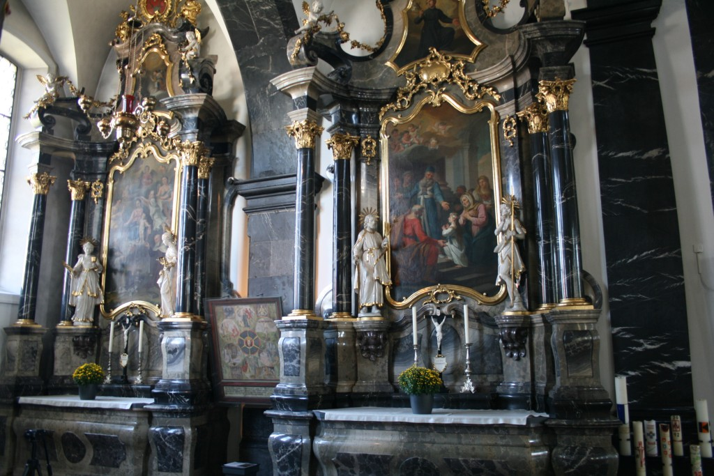 Pfarr- und Wallfahrtskirche Sachseln, Schweiz, linke Seitenaltäre